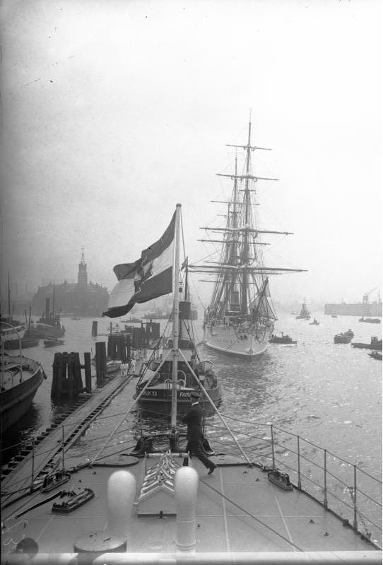 Argentinischer Freundschaftsbesuch in Bremerhafen! Das Argentinische Schulschiff "Presidente Sarmiento" welches Deutschland einen Freundschaftsbesuch abstattet weilt augenblicklich in Bremerhafen.